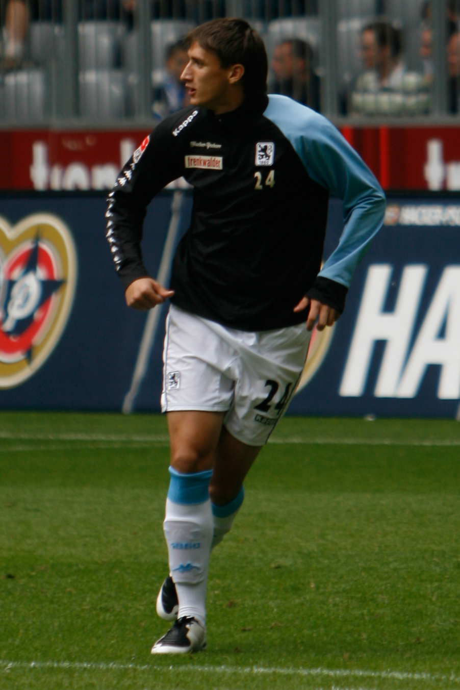 Mustafa Kučuković from 1860 in halftime warm-up 1860 - Koblenz, Allianz Arena